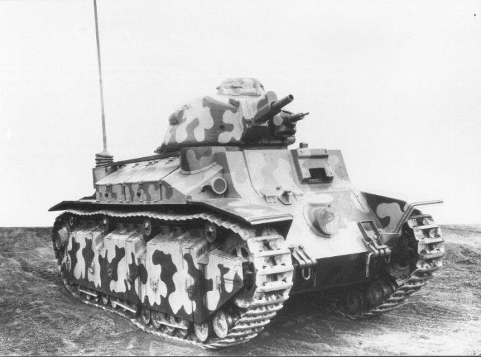 Carro armato Char D2